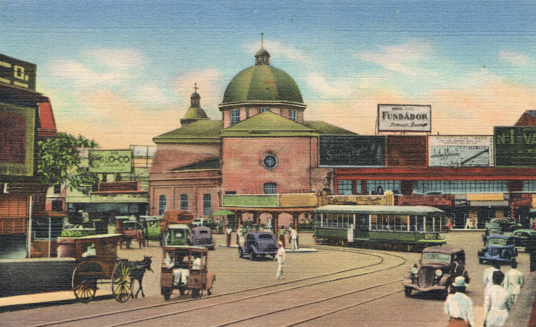 Plaza Goiti Manila